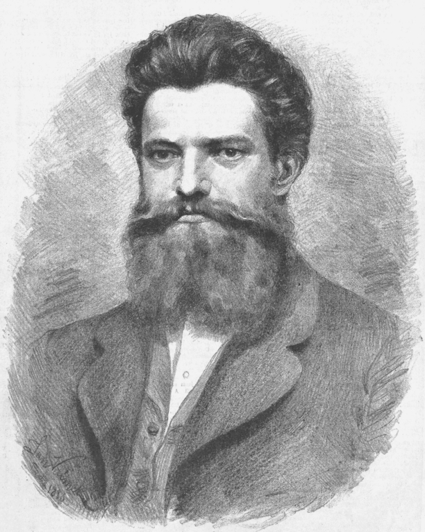 Portrét, nakreslený Janem Vilímkem pro Humoristické listy